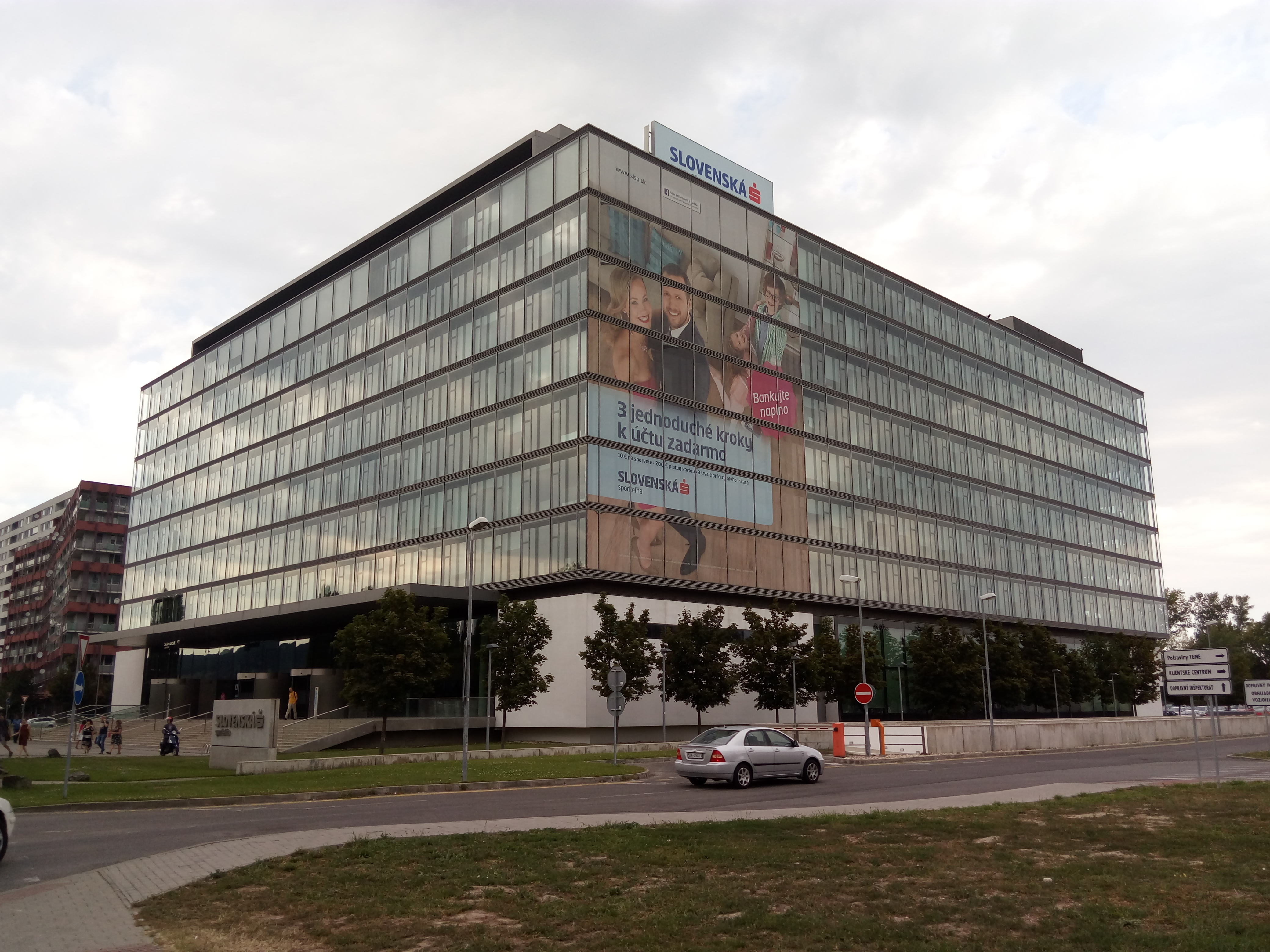 Tomášikova 48, Nové Mesto, Bratislava